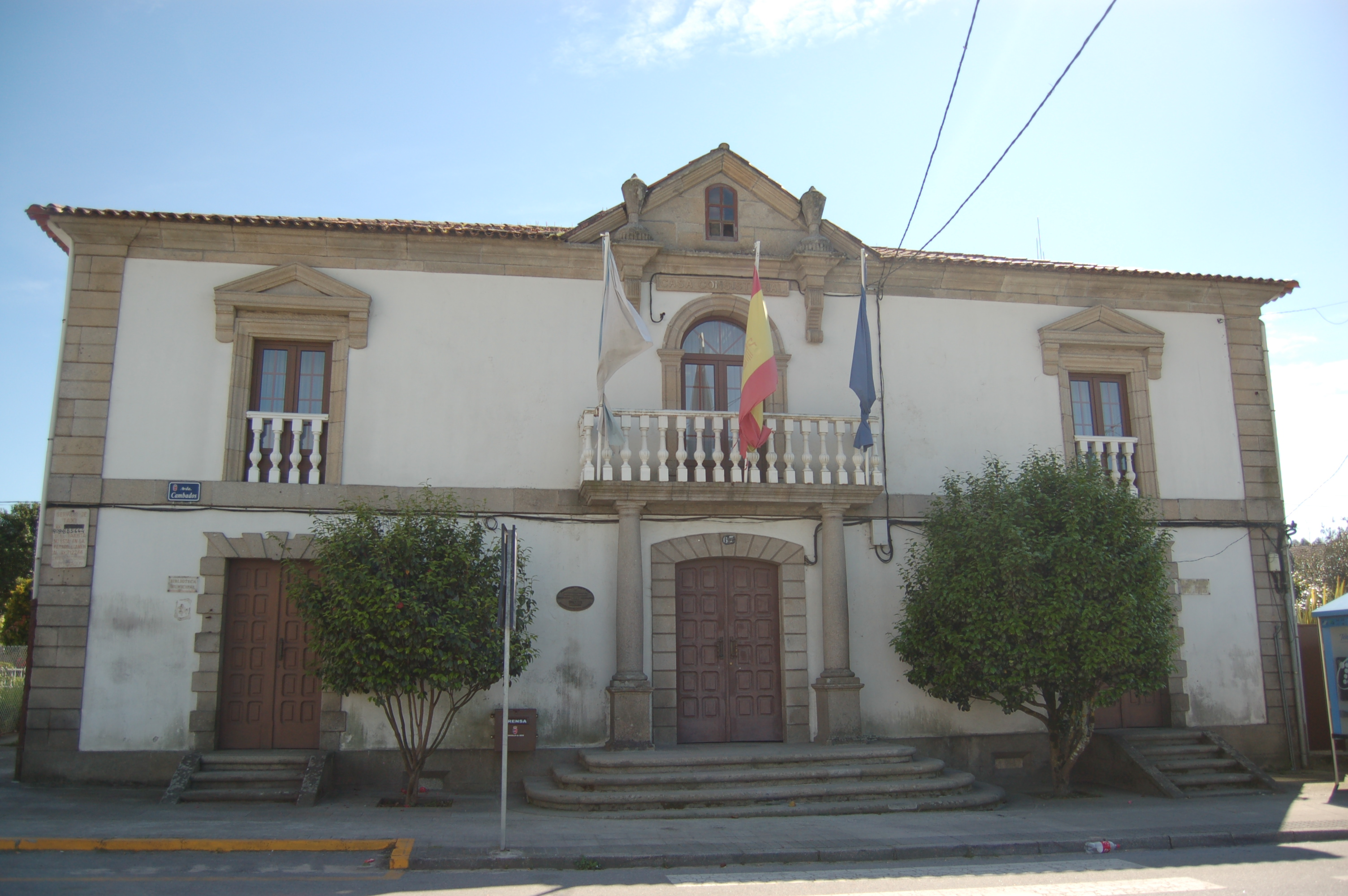 Casa consistorial de Meis